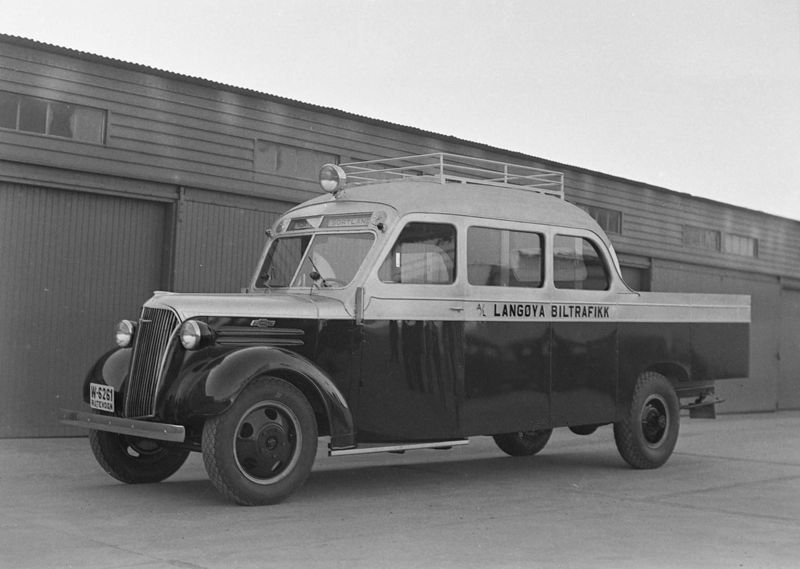 Buss/lastebil fra Anco til Langøya Biltrafikk. Fotografert i Trondheim